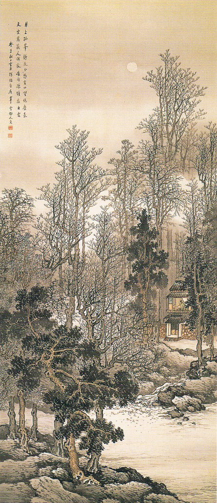 絹本墨画著色軸装 宮内庁三の丸尚蔵館 第7回文展出品作